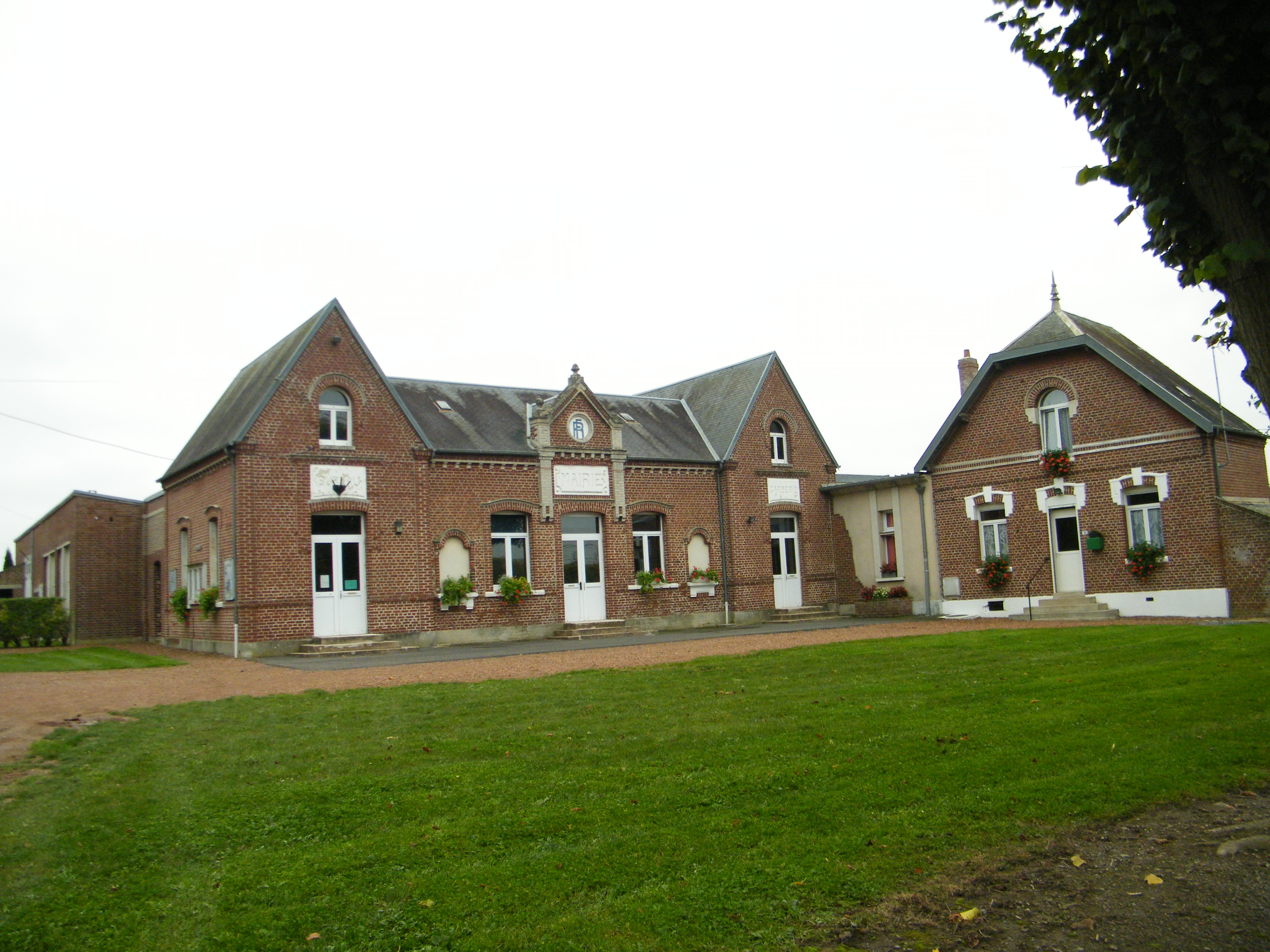 Bâtiments communaux.